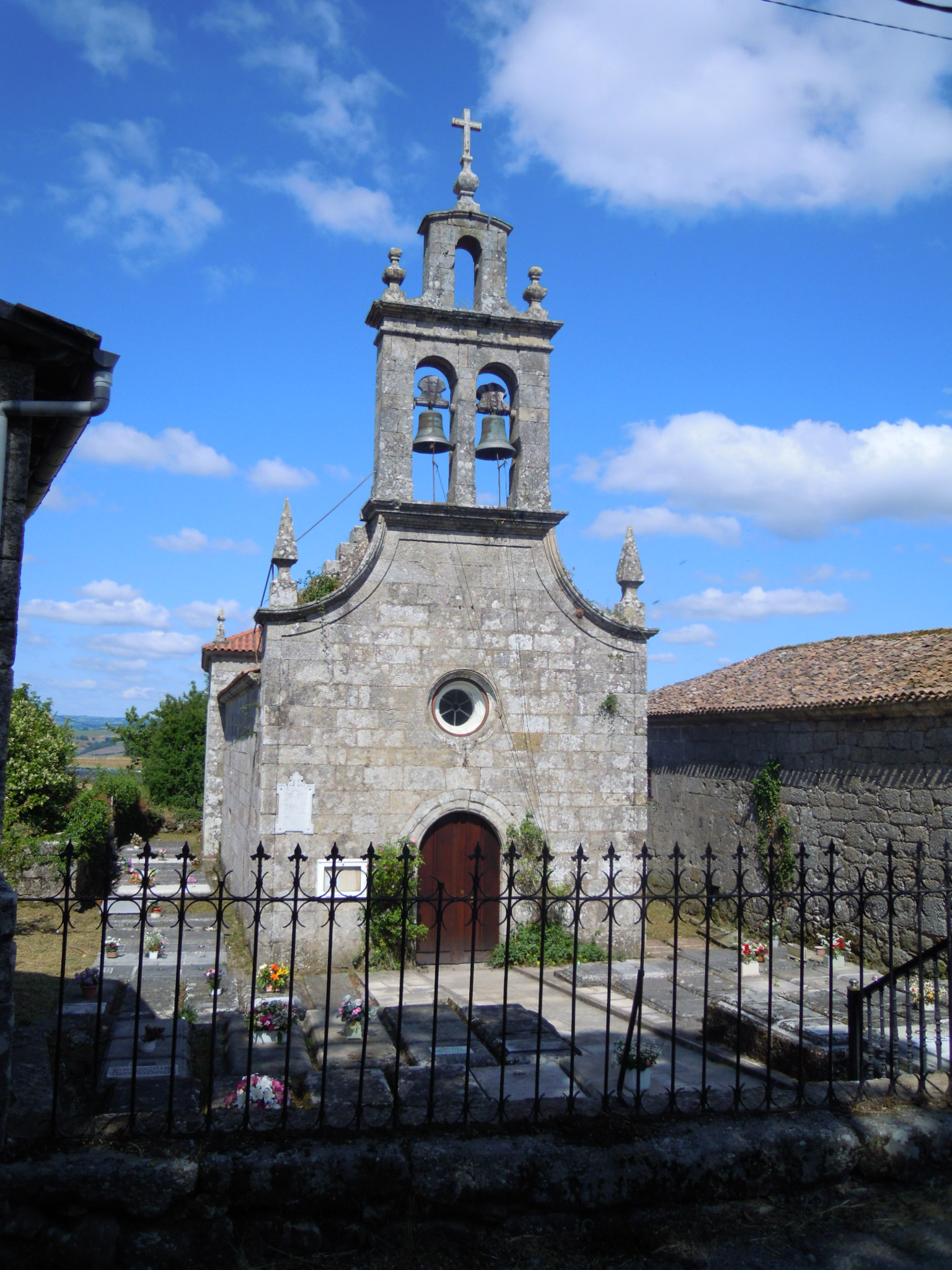 Igrexa parroquial de Pedrafita (Chantada), no lugar de Mosteiro